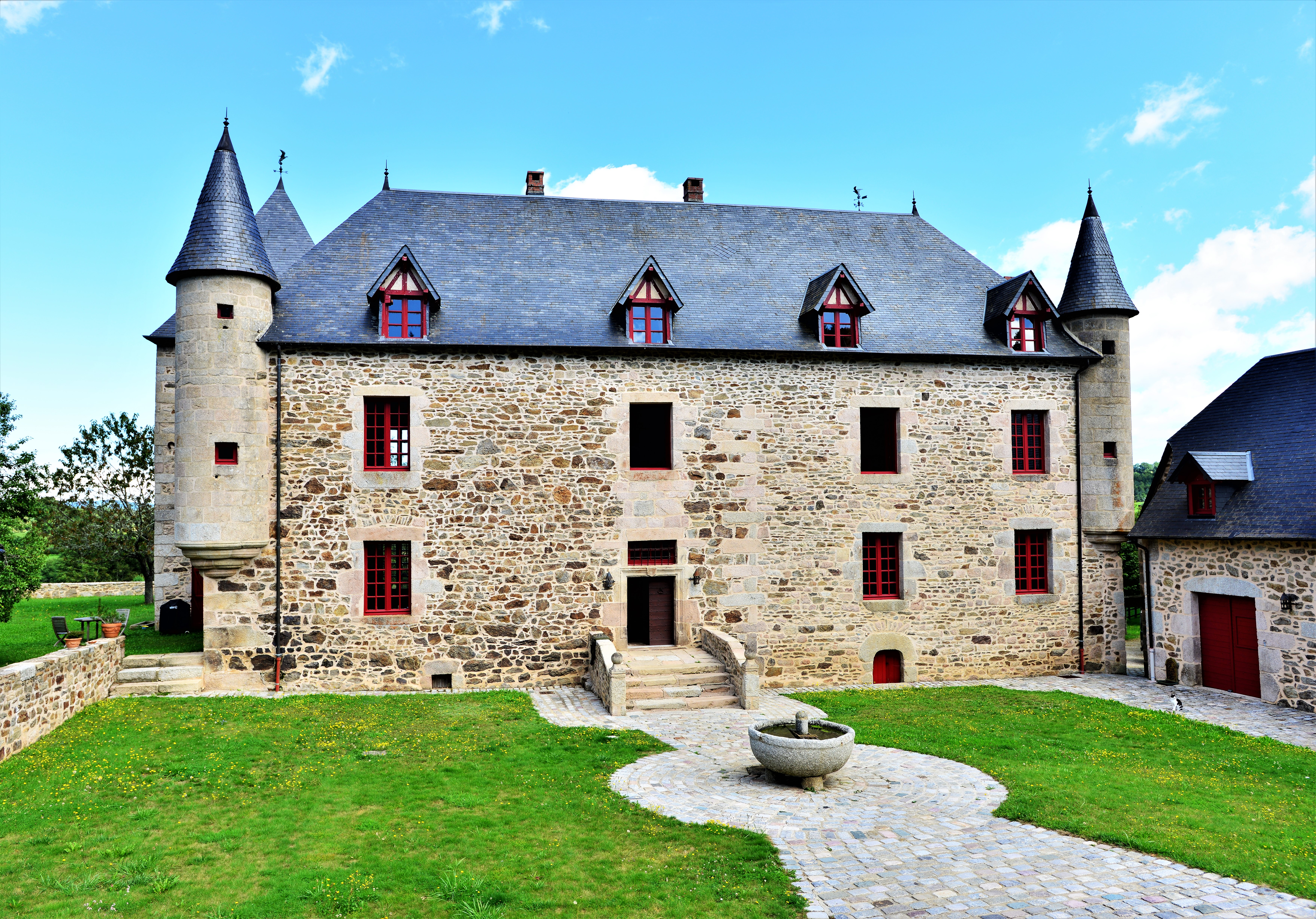 Le château de Saint Germain Lavolps est mentionné dès le XVème siècle. Acquis en 1661 par Antoine de la Barre, c'est vraisemblablement ce dernier qui fit construire l'édifice actuel. Menaçant de tomber en ruines dans les années 1970, il sera restauré à partir des années 90, puis labellisé patrimoine historique en 1999.